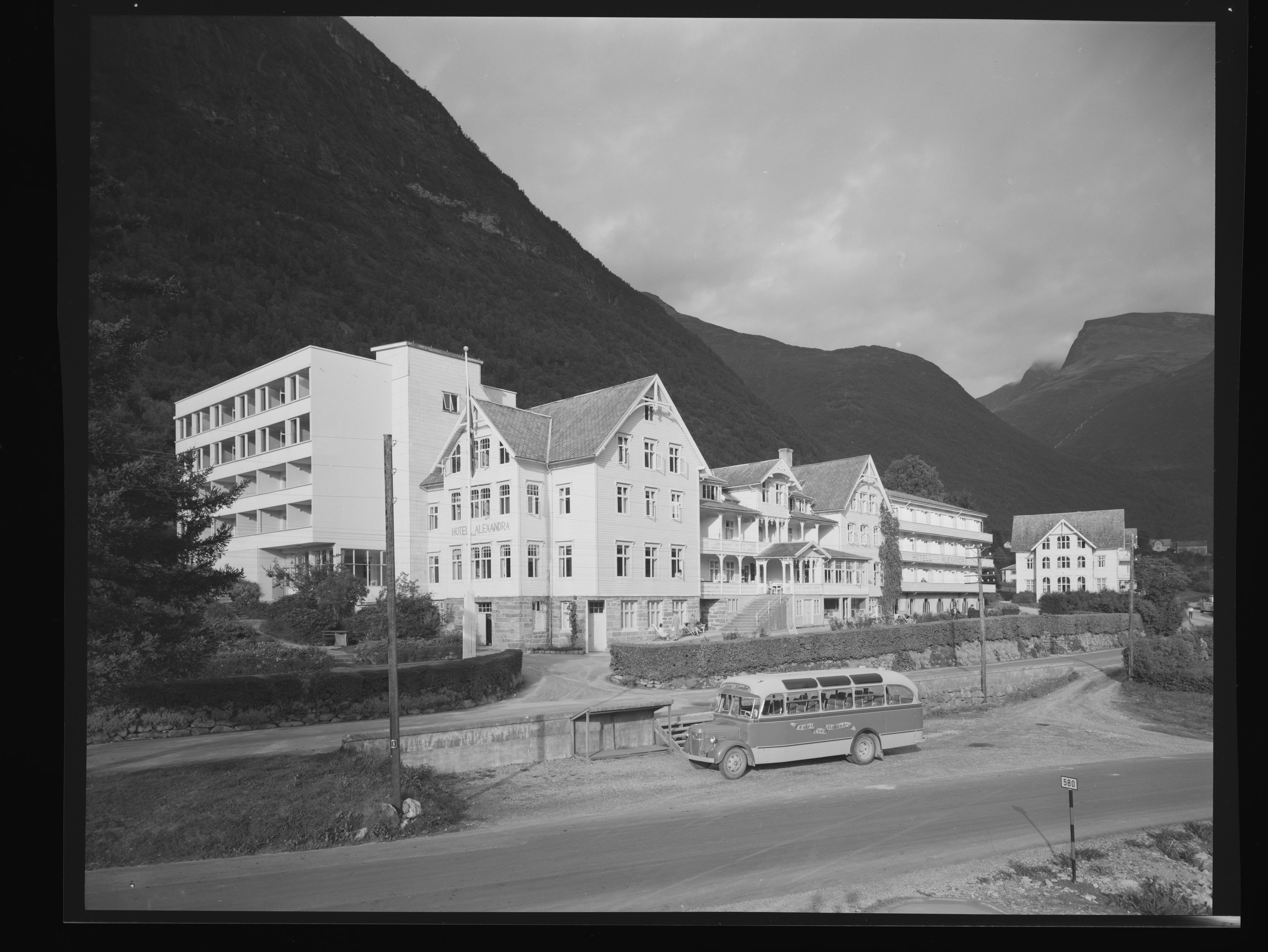 Bildet er hentet fra Nasjonalbibliotekets bildesamling. Anmerkninger til bildet var: Fotograf: ÅM Loen, Stryn, Sogn og Fjordane